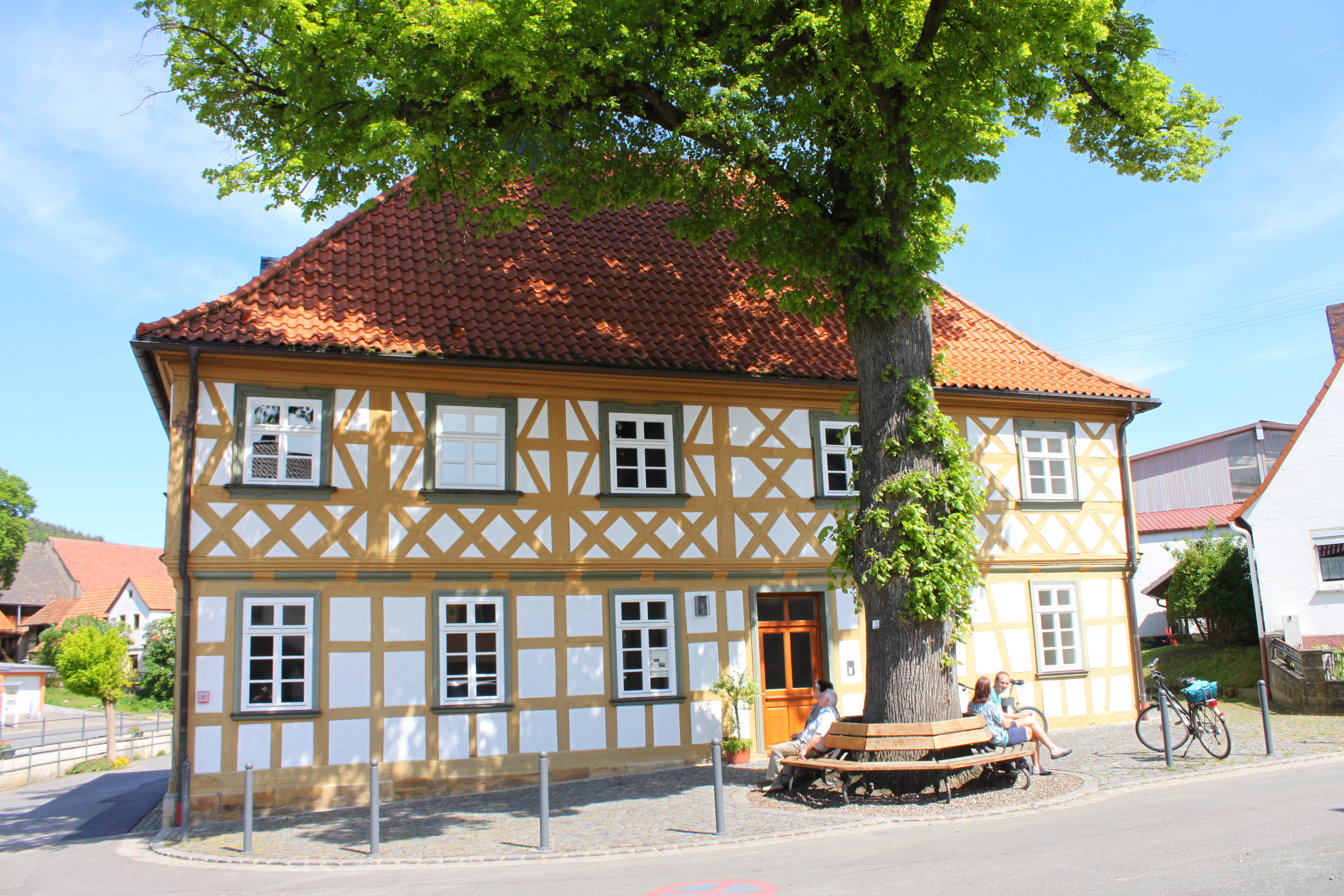 Gemeindehaus Loffeld, Mühlteich 1, Baudenkmal D-4-78-165-170